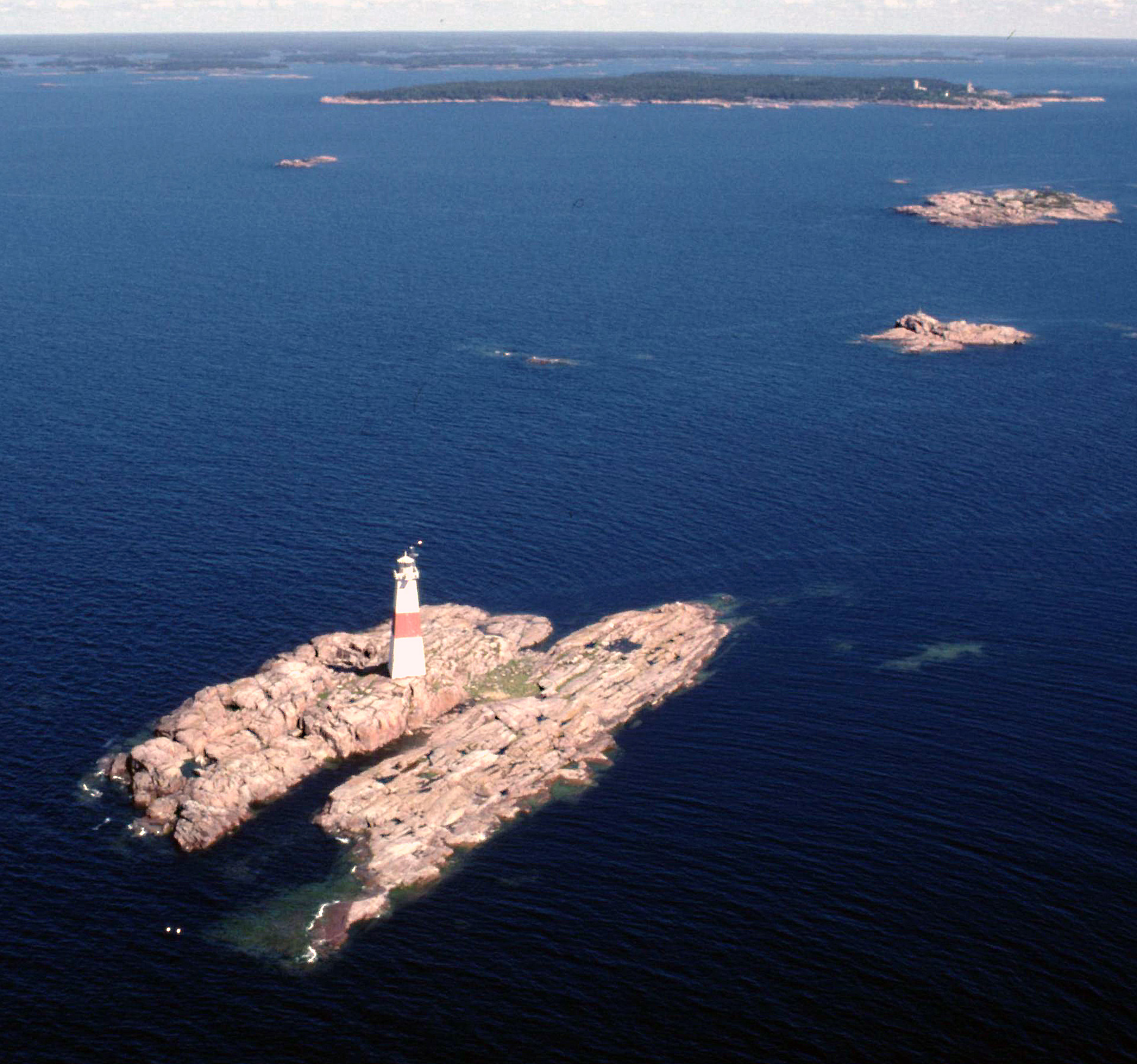 Sundharun and Jussarö 1994